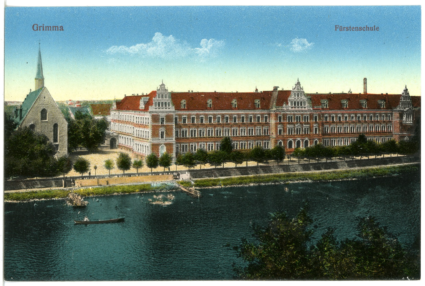 Grimma; Fürstenschule This postcard is from publisher Brück & Sohn in Meißen ( postcard has a unique number 19716 and is available in a higher resolution at the publisher. This images was uploaded in a cooperation project between Wikipedians and the publisher.